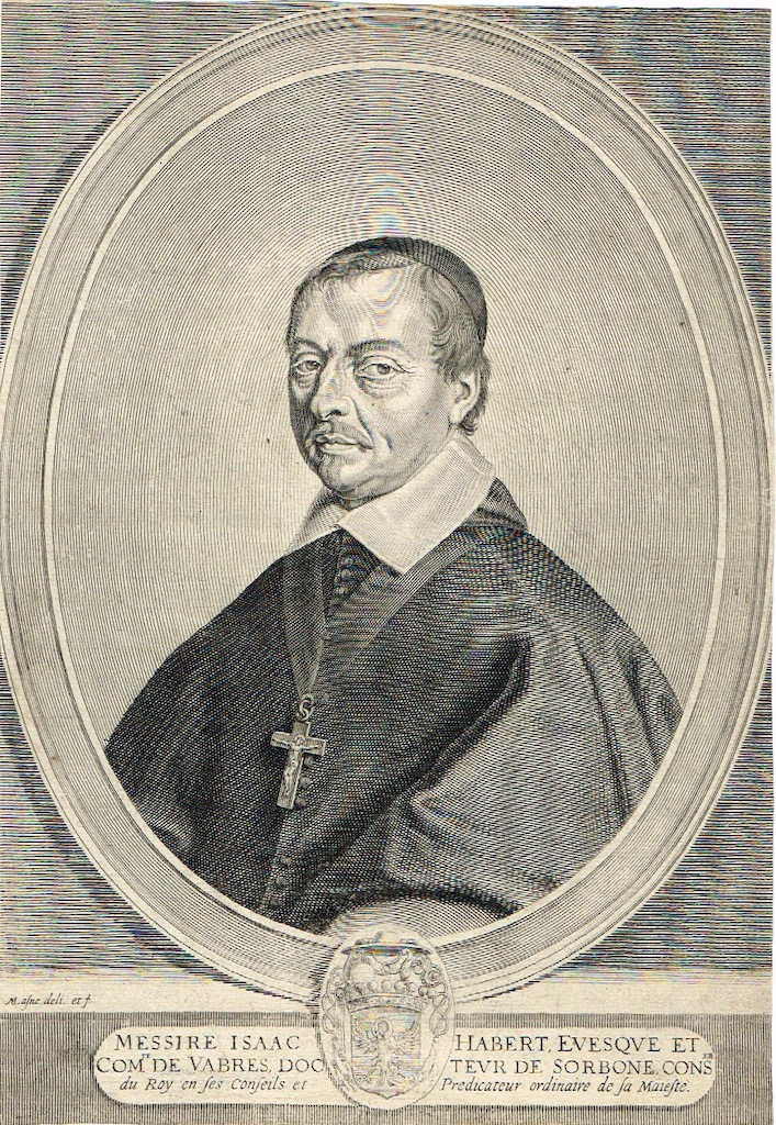 Portrait d'Isaac HABERT évêque de Vabres - gravure originale de Michel LASNE